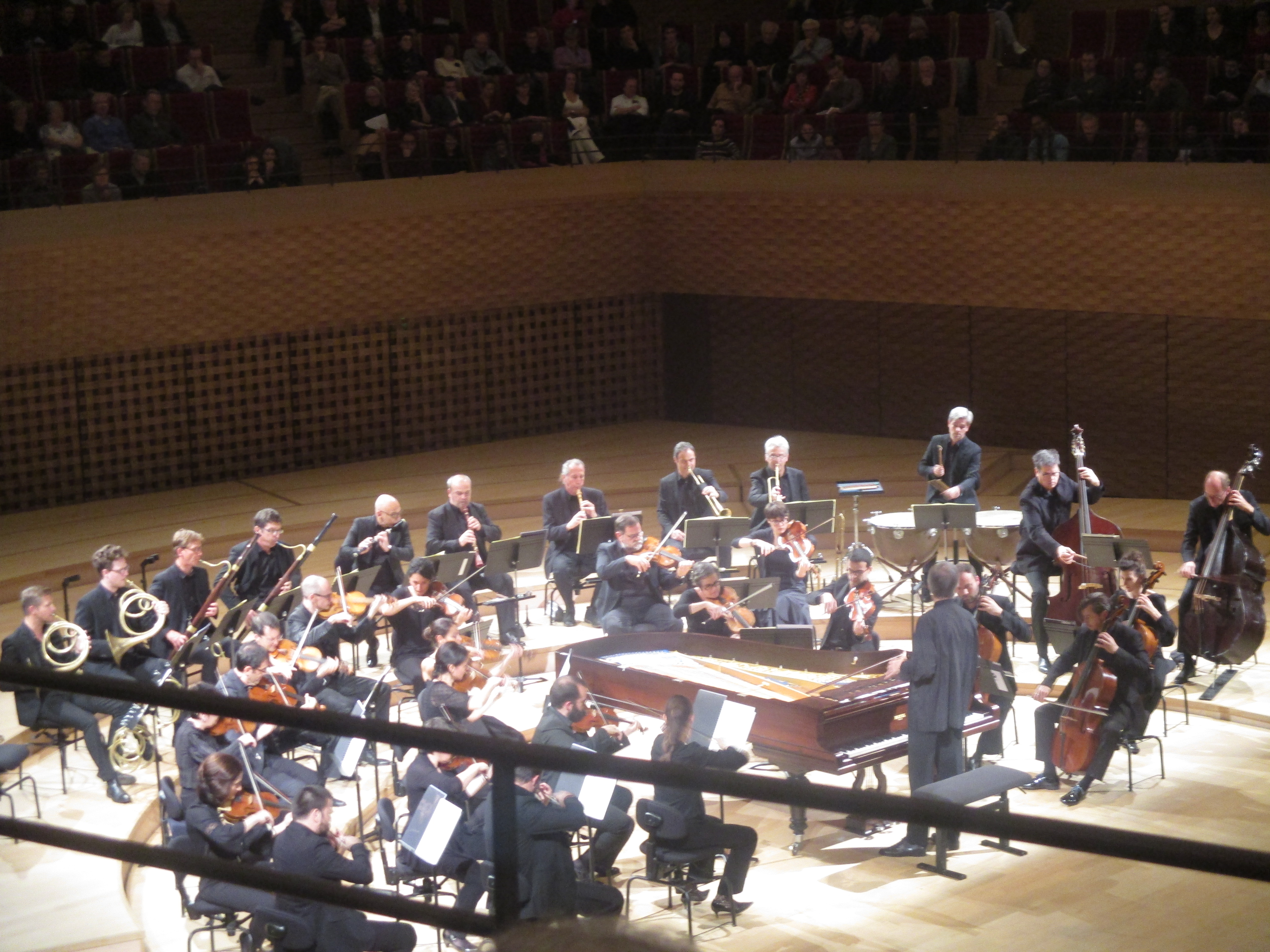 Christian Zacharias dirige l'Insula Orchestra à l'auditorium de La Seine musicale (île Seguin) dans le concerto n° 20 en ré mineur K 466 de Mozart, le 8 novembre 2018.